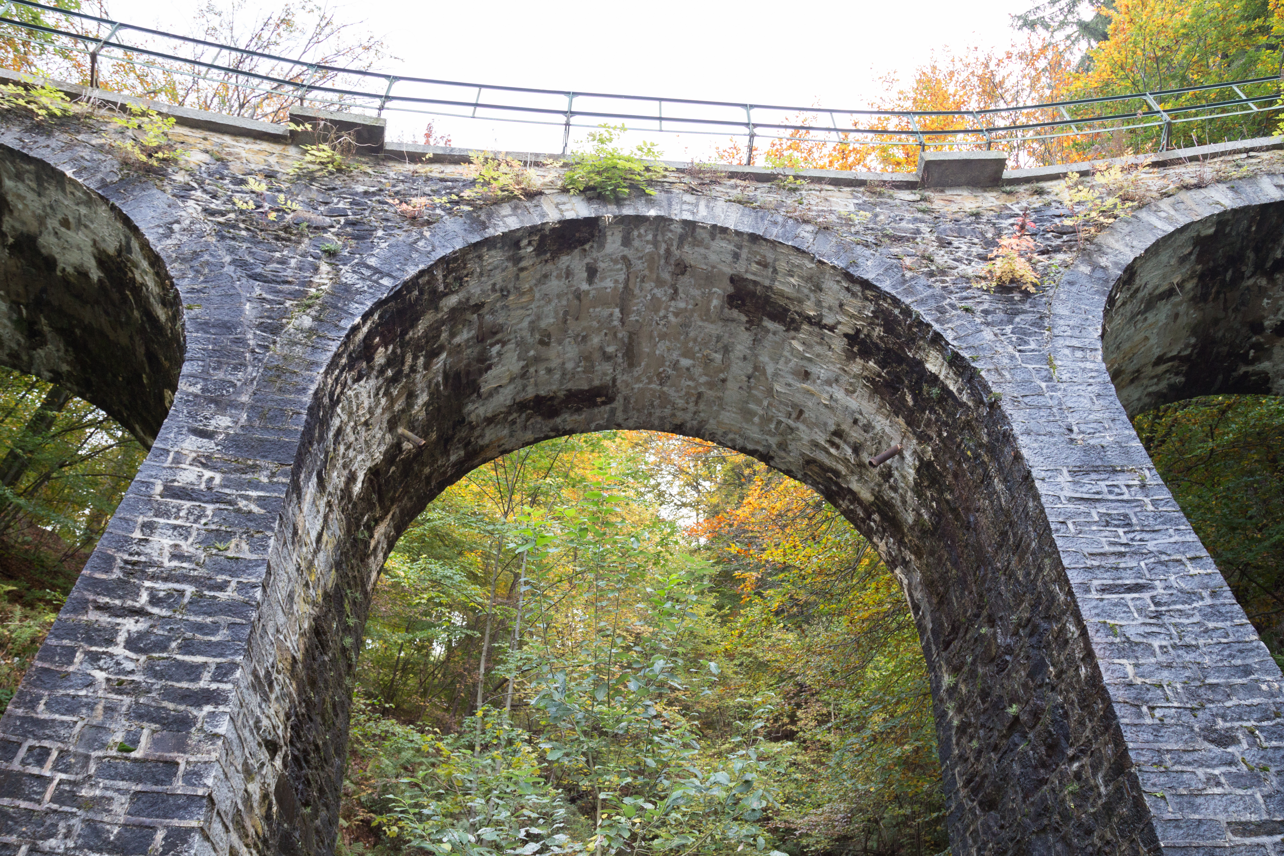 Riserva speciale del Sacro Monte di Oropa (Q47362077)